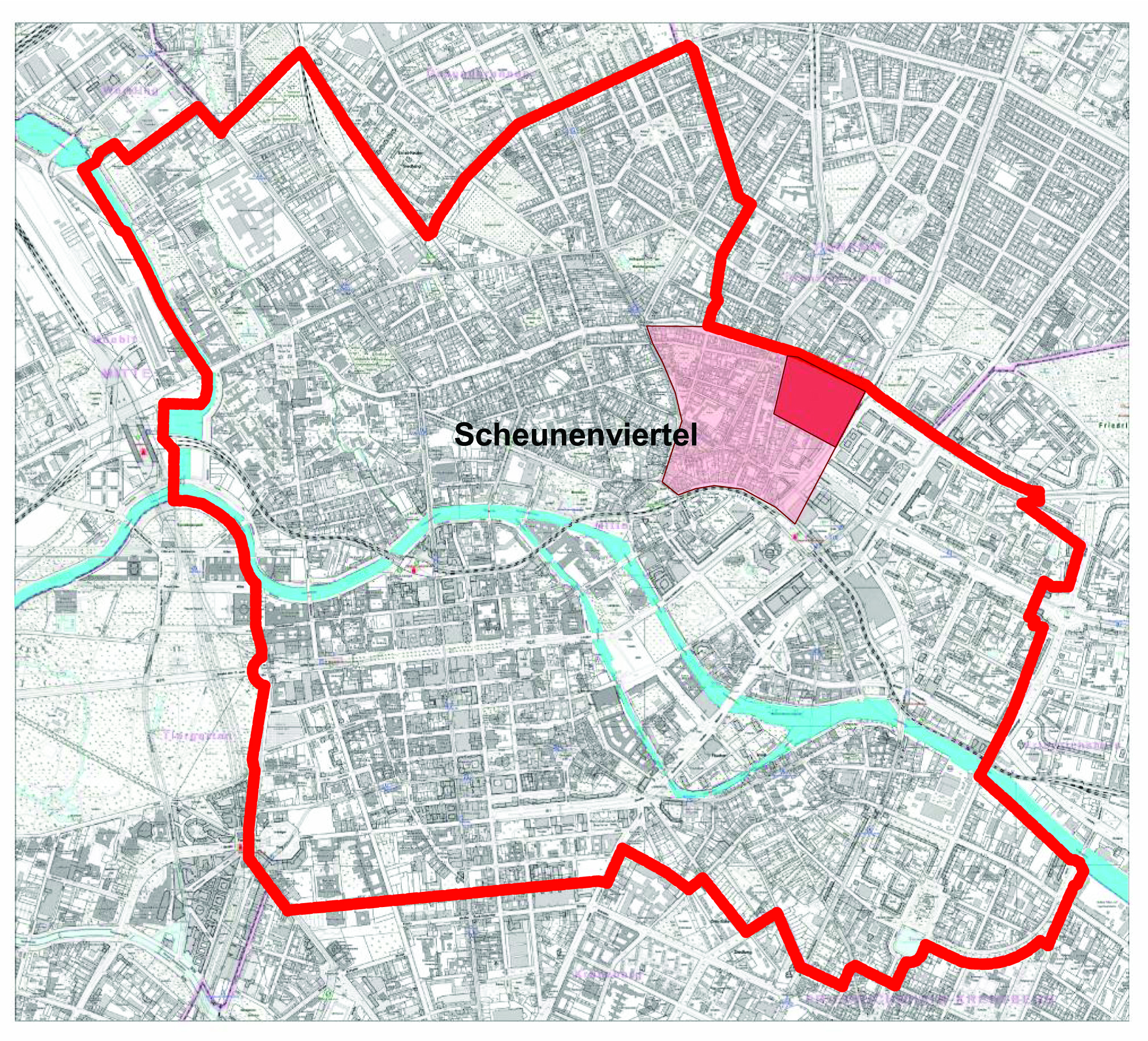 Scheunenviertel in Berlin-Mitte, dunkelrot das urspr. Scheunenviertel